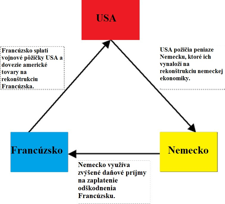 Schéma Dawesovho plánu